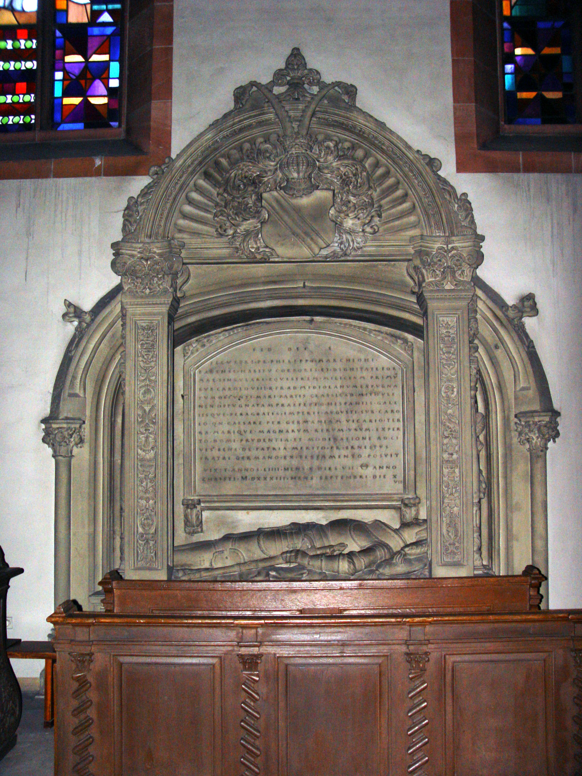 Motiv: Grab von Philipp I. von Baden in der Stiftskirche von Baden-Baden. Fotografiert von Martin Dürrschnabel Kamera Sony DSC-F717